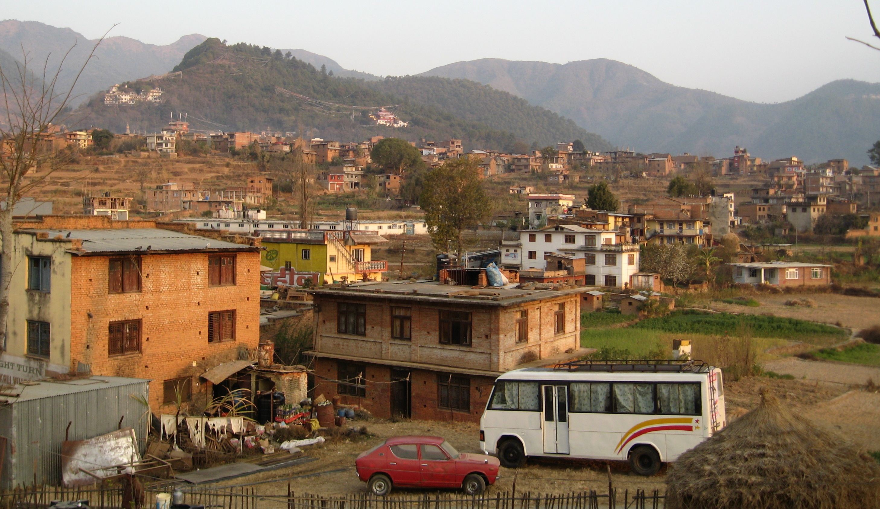 Dakshinkali